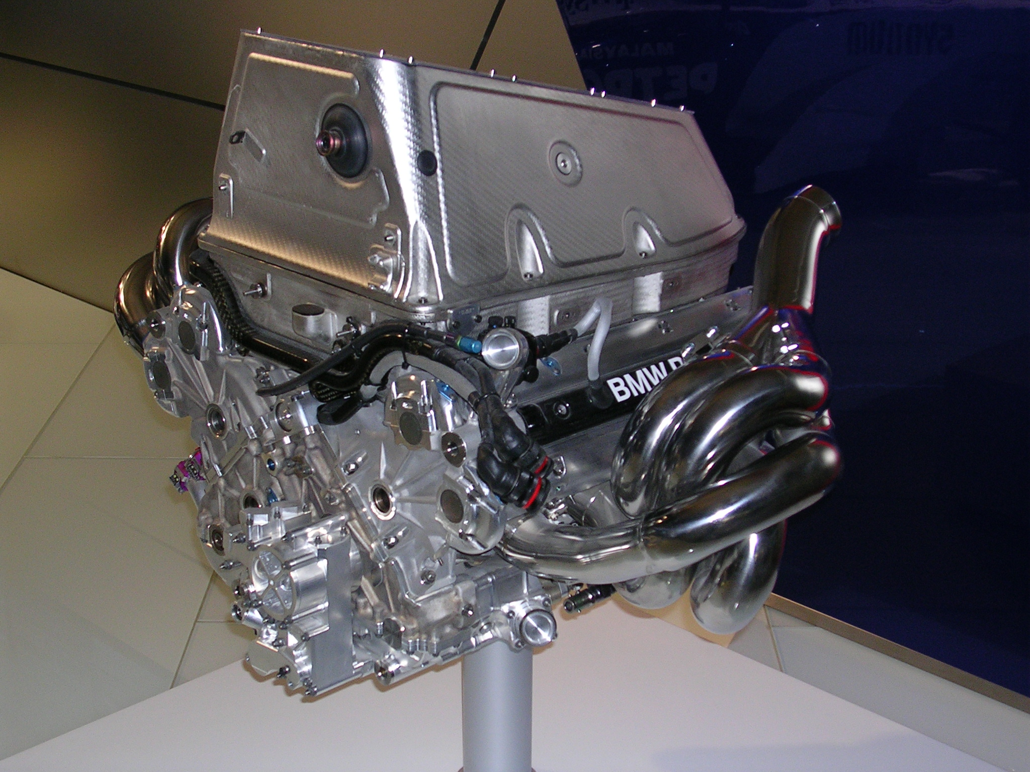 P86 V8 engine of a BMW Sauber F1.06. BMW Welt, Munich.